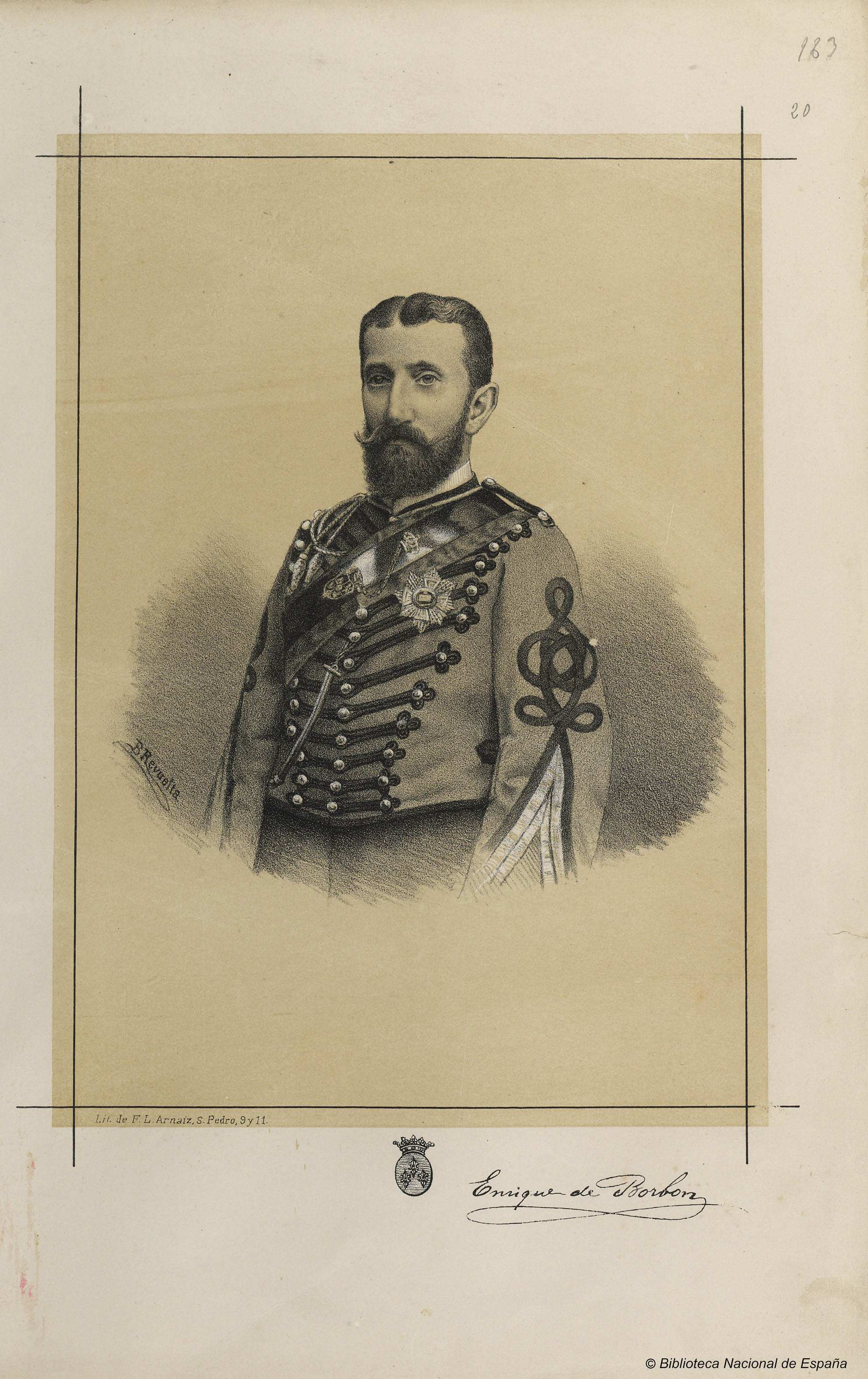 Retrato de Enrique Pío María de Borbón y Castellví, litografía de Félix Lucio Arnaiz, Madrid, 1879